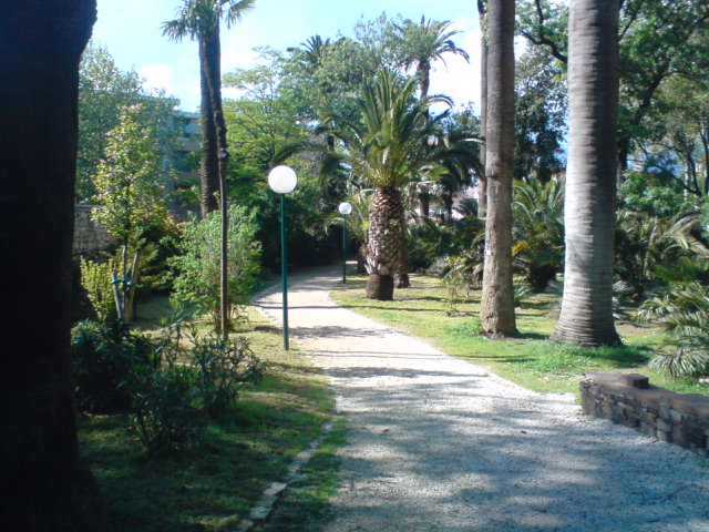 Parc Victor Cravéro